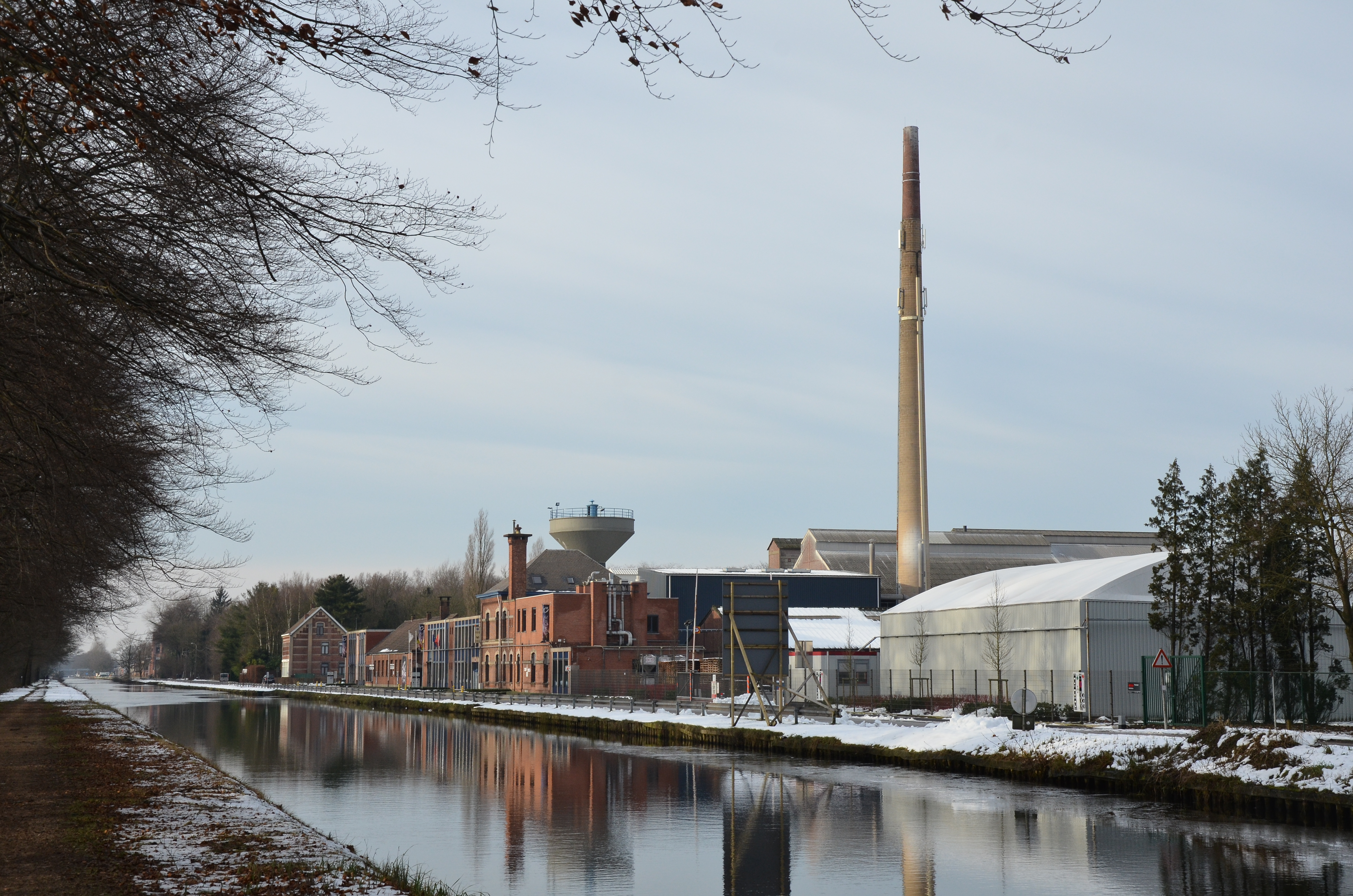 Fabriek Campine of oud Chimical